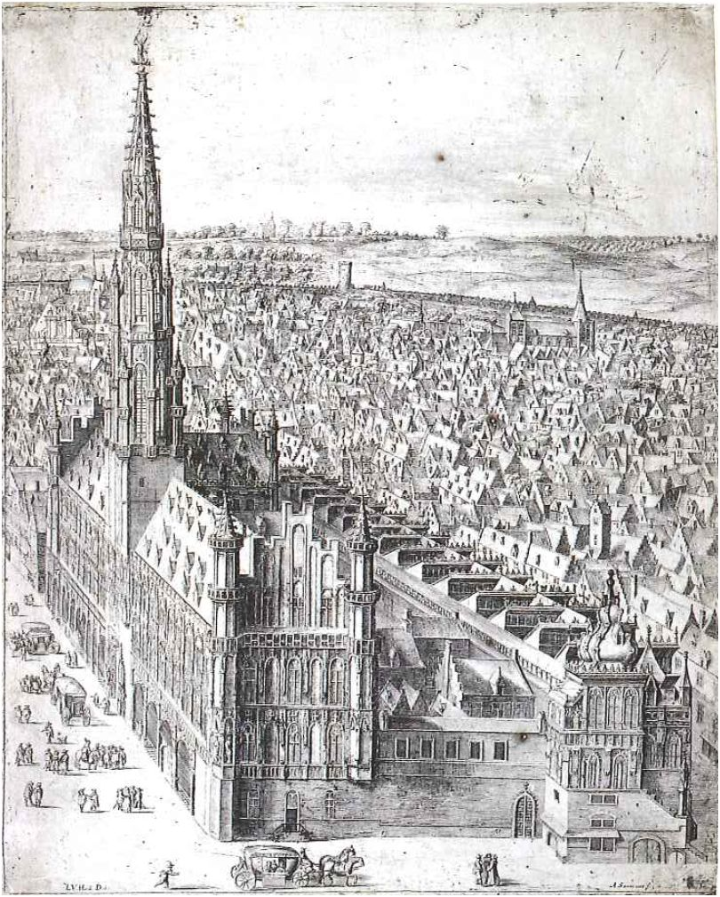 Gegraveerde prent van Abraham Dircksz. Santvoort naar een schilderij van Leo van Heil, ca. 1650. Voormalige Lakenhal (1353) aan achterzijde en Boterpot (huis met archieven) afgebeeld. Bewaard in Koninklijke Bibliotheek Brussel.